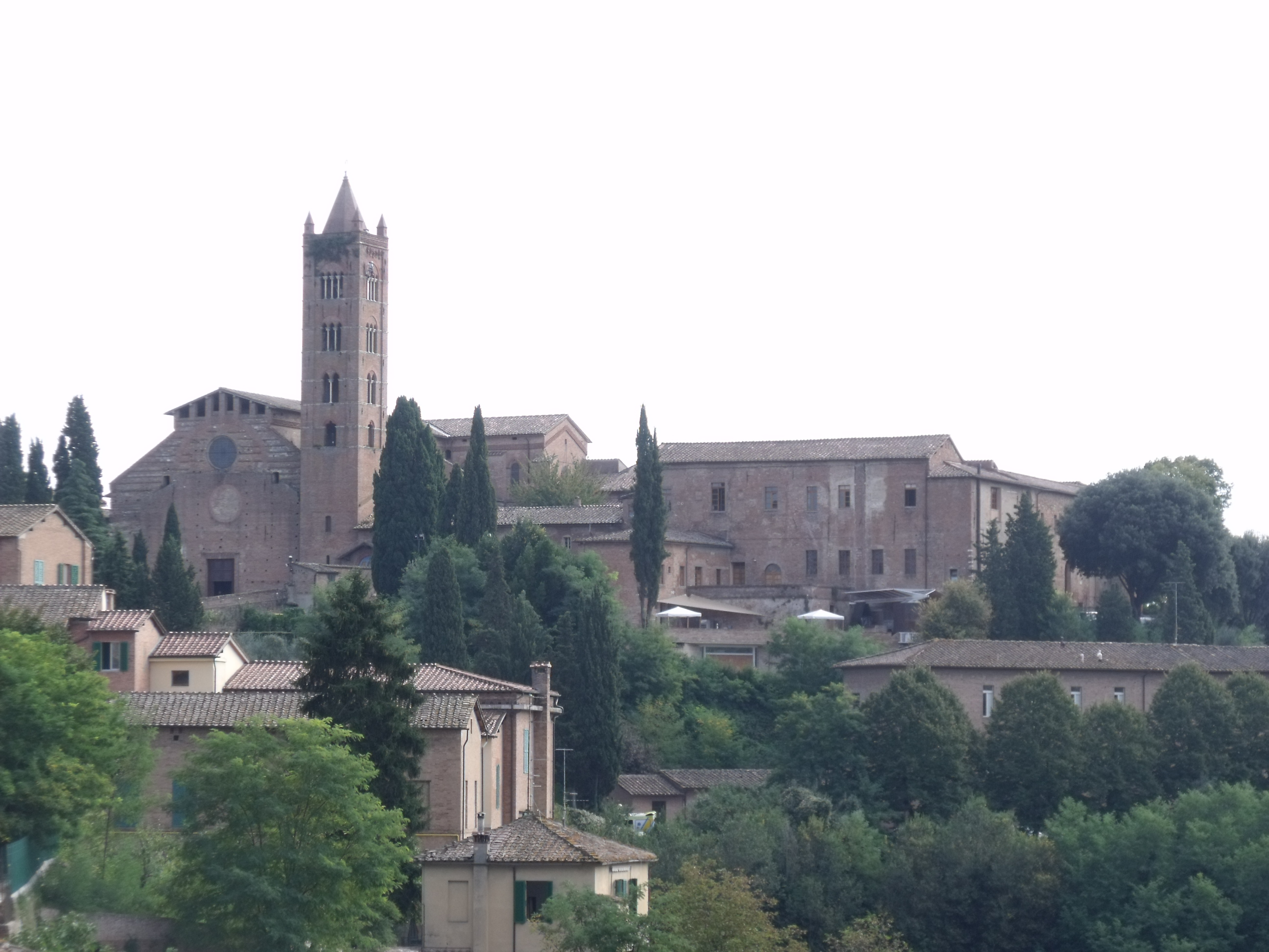 Die Basilica di San Clemente in Santa Maria dei Servi in Siena von der Piazza del Mercato aus gesehen